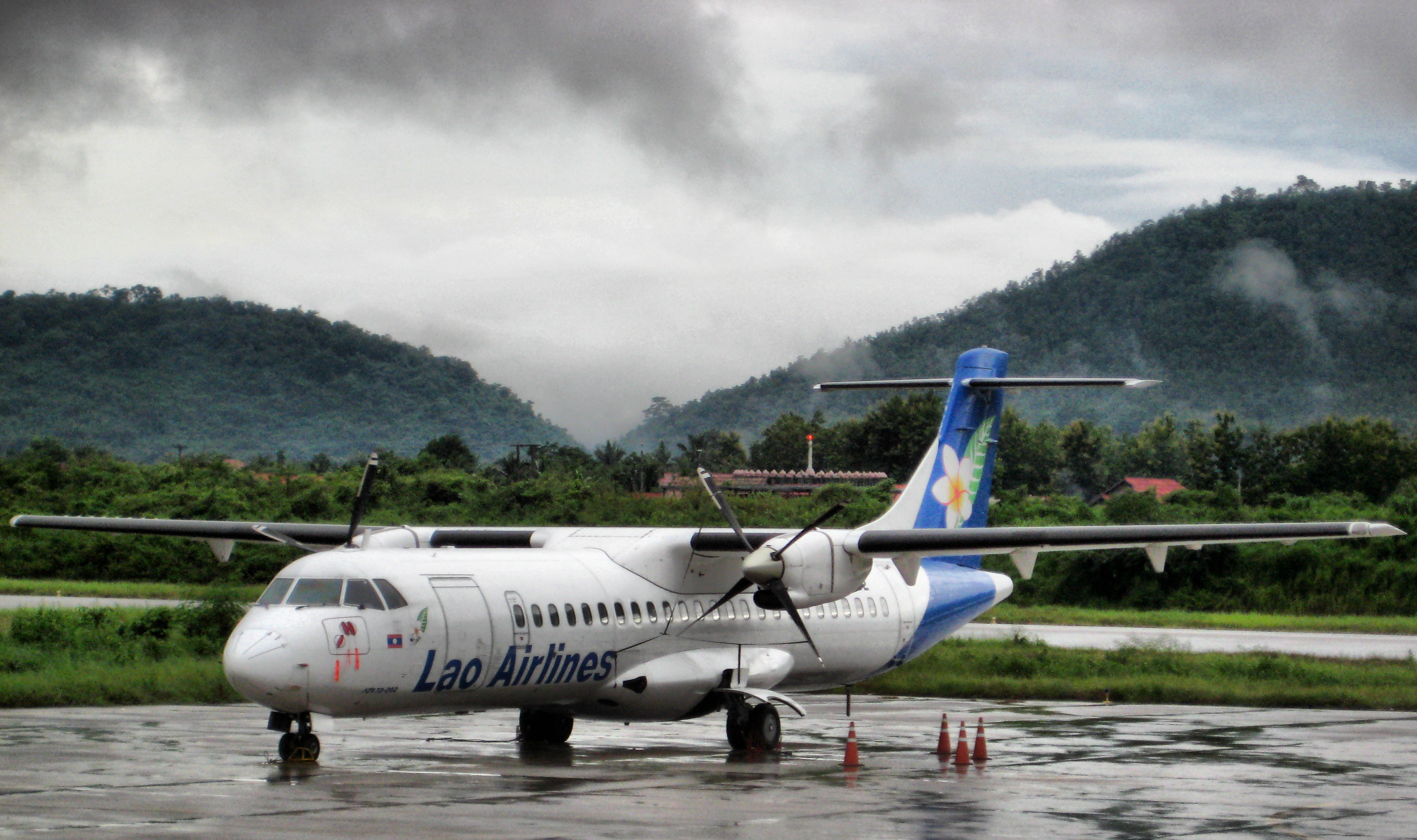 Lao Airlines